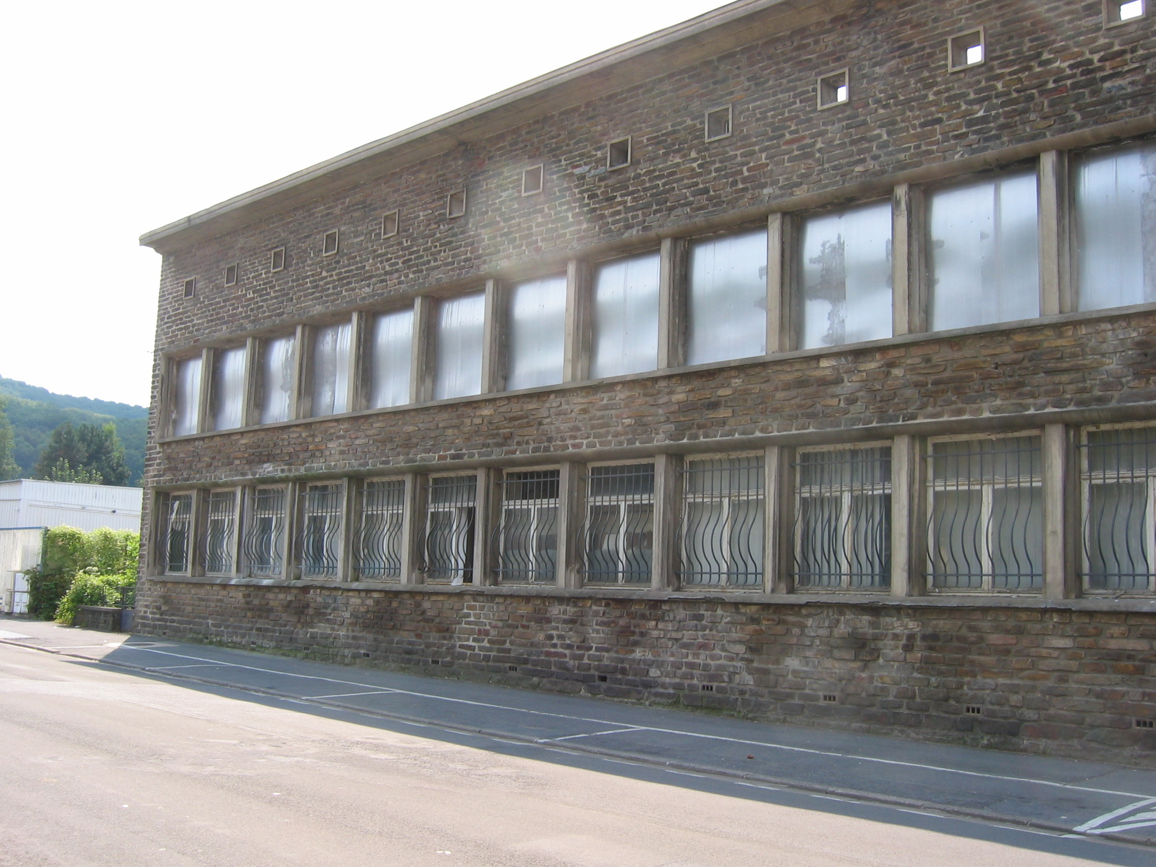 Bureaux, façade coté rue, des ex-Ateliers Thomé-Génot puis Ardennes Forge à Nouzonville Ardennes France